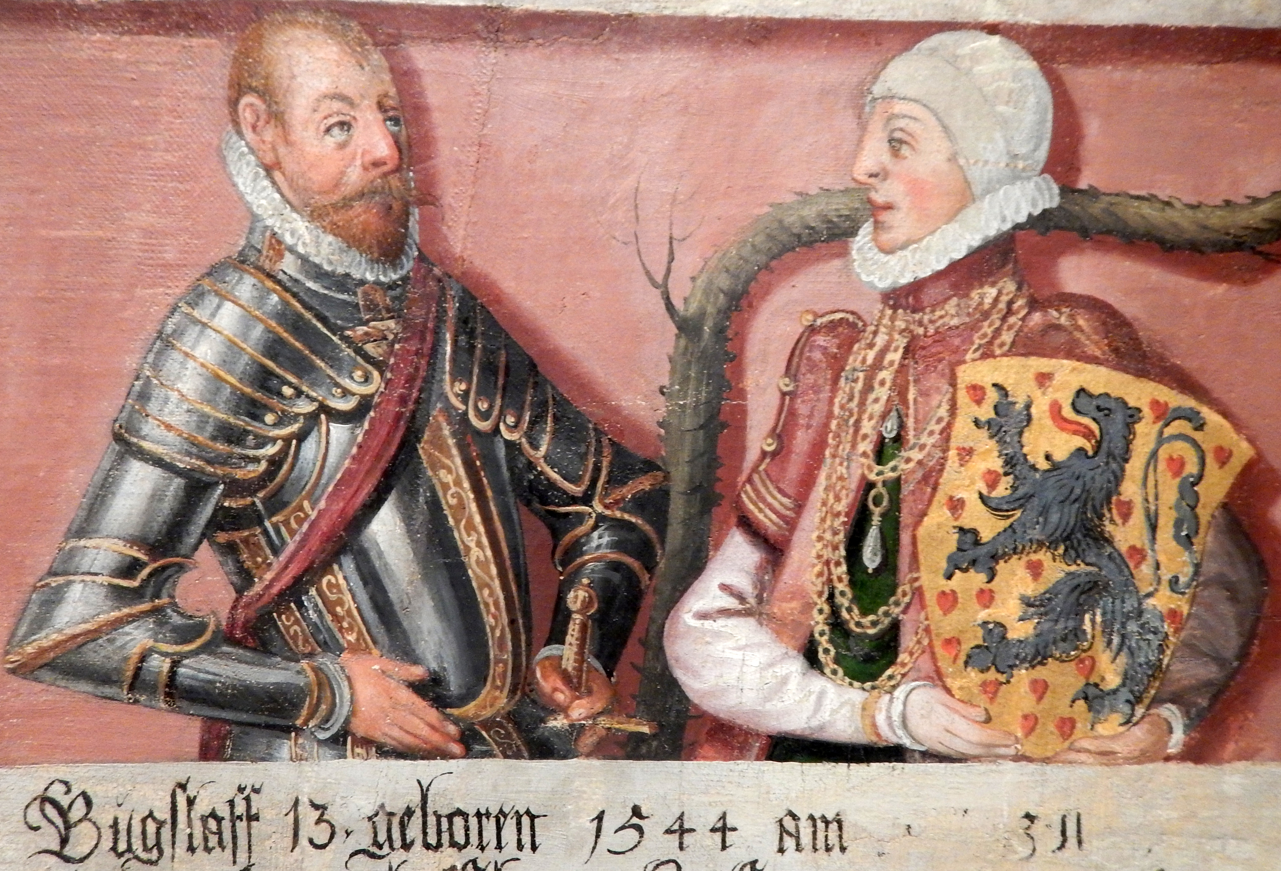 Bogislaw XIII. von Pommern mit seiner ersten Gemahlin Klara von Braunschweig-Lüneburg. Aus dem Stammbaum der Greifen von Cornelius Krommeny.